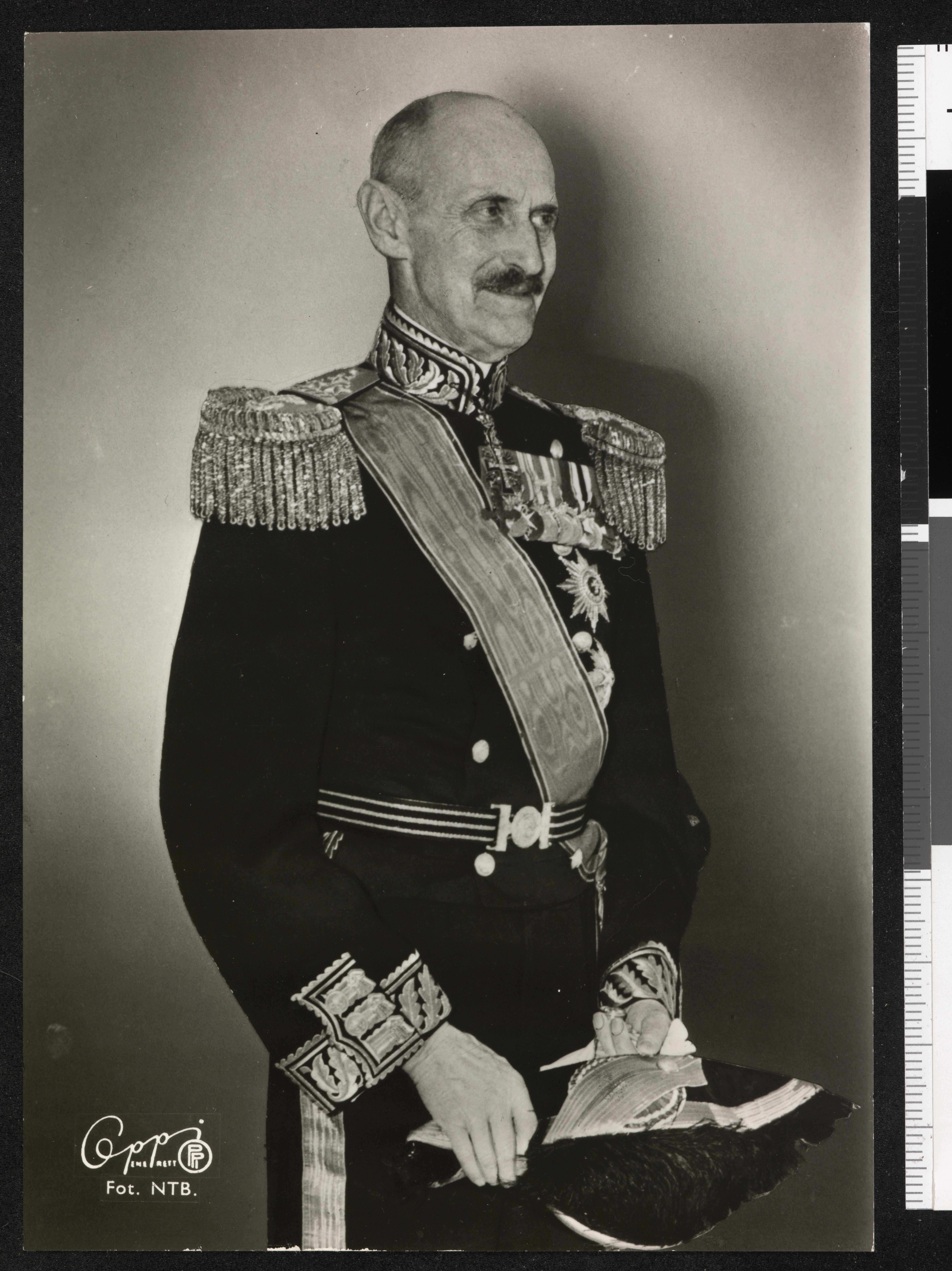 Bildet er hentet fra Nasjonalbibliotekets bildesamling. Anmerkninger til bildet var: Bildet er et av de få portrettene av kong Haakon VII der han smiler. Kombinasjonen av kongens norske og danske ordener tyder på at bildet kan være tatt under feiringen av hans 75- årsdag i august 1947, eventuelt under det danske statsbesøket til Norge samme høst. Depicted person: Haakon VII konge av Norge